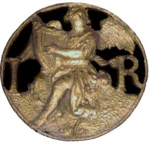 rosace de clavecin Ioannes Ruckers century XVII